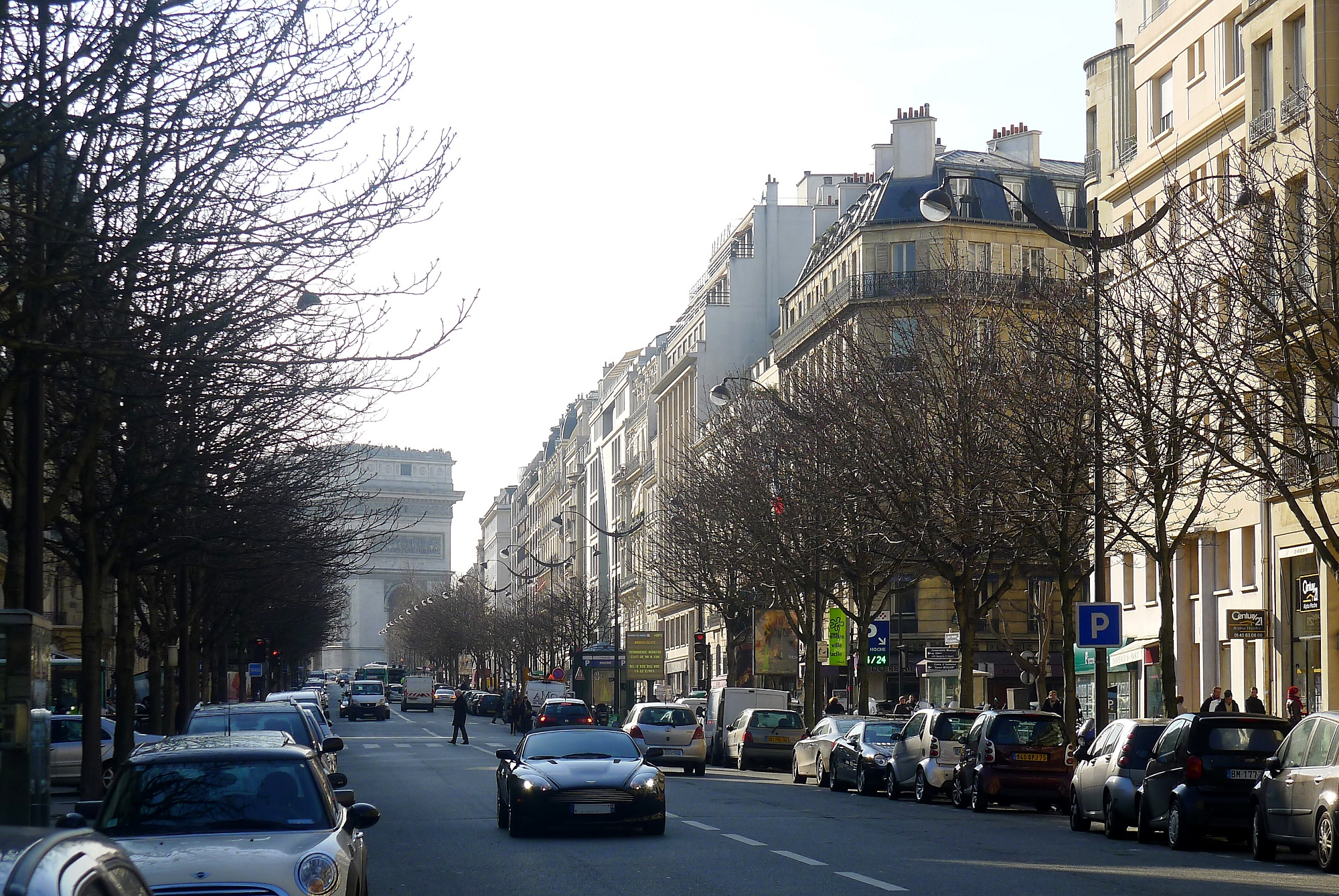 Avenue Hoche - Paris VIII